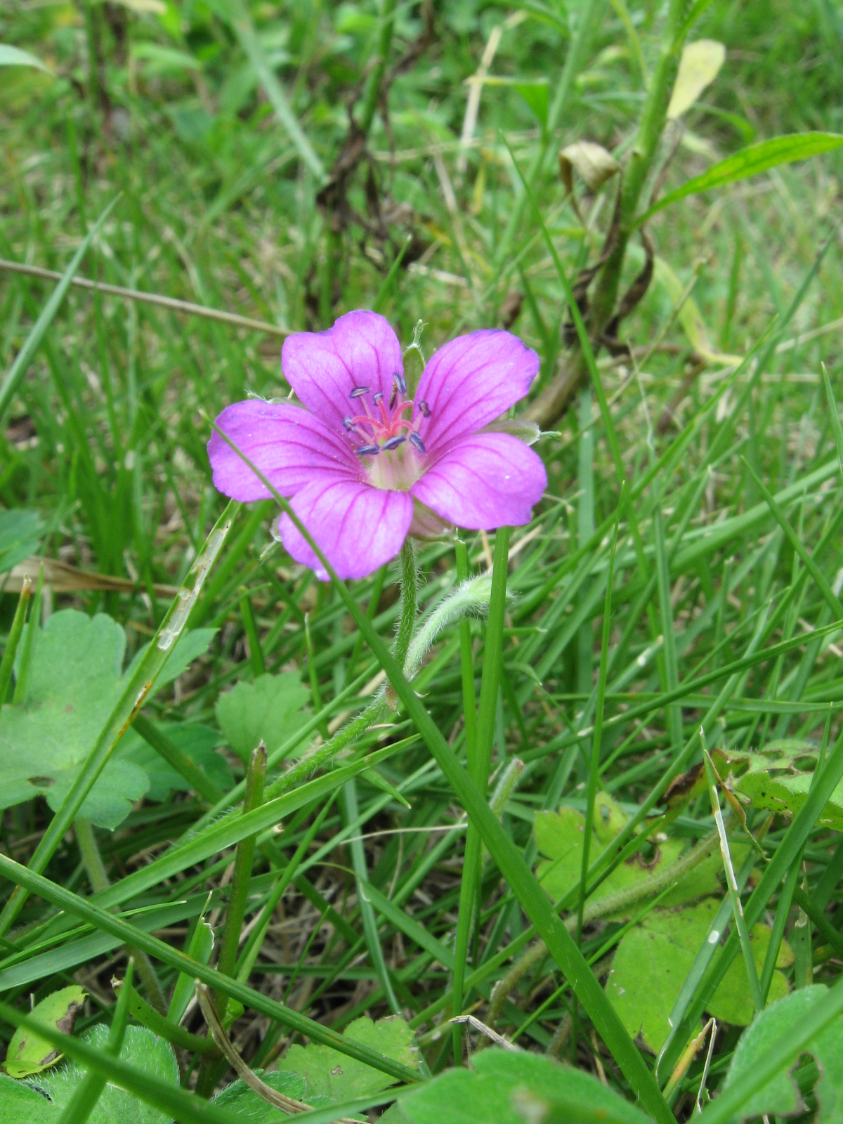 ゲンノショウコ。神奈川県愛甲郡清川村にて撮影。